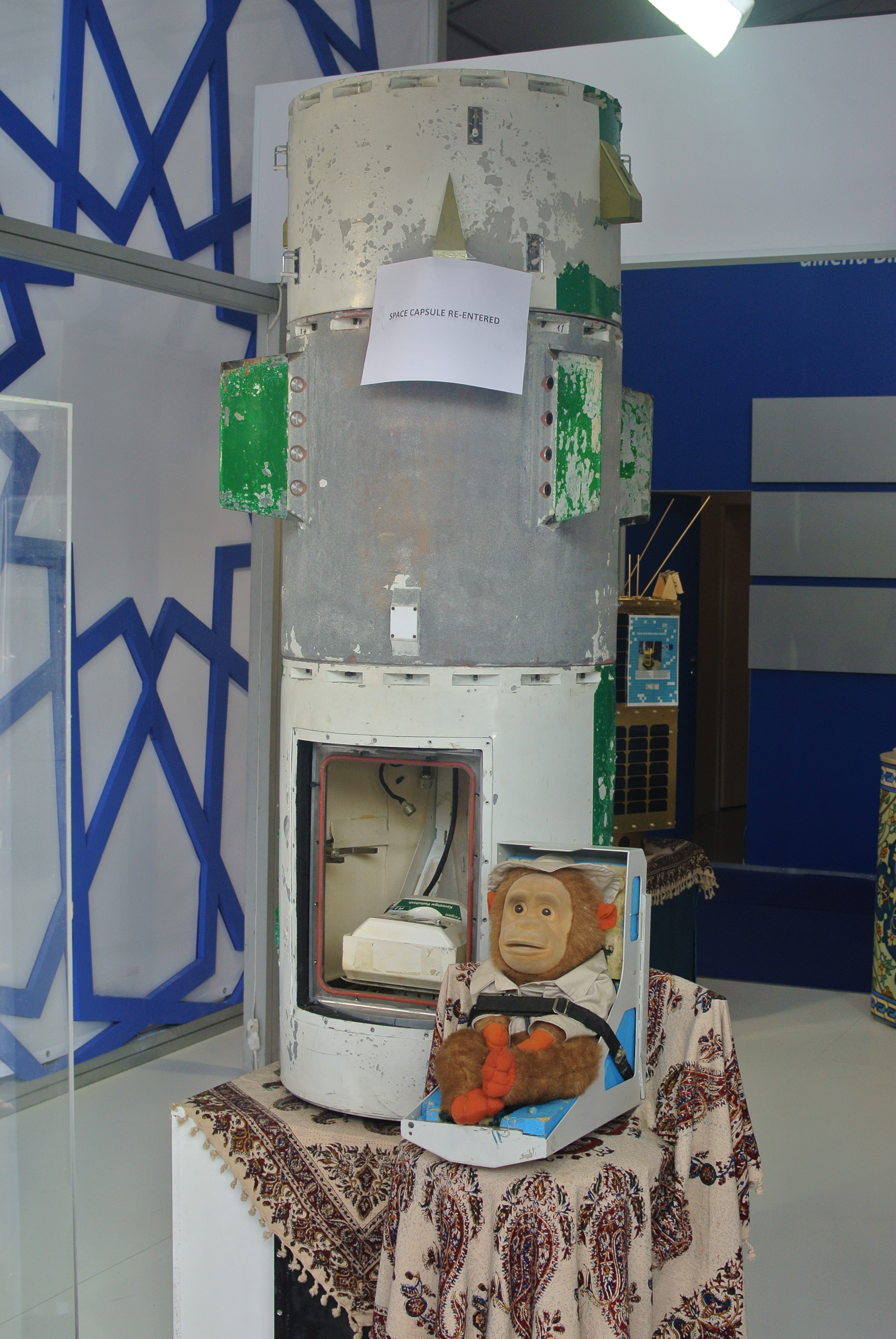 Капсула «Пишгам», совершившая суборбитальный полёт с обезьяной на борту